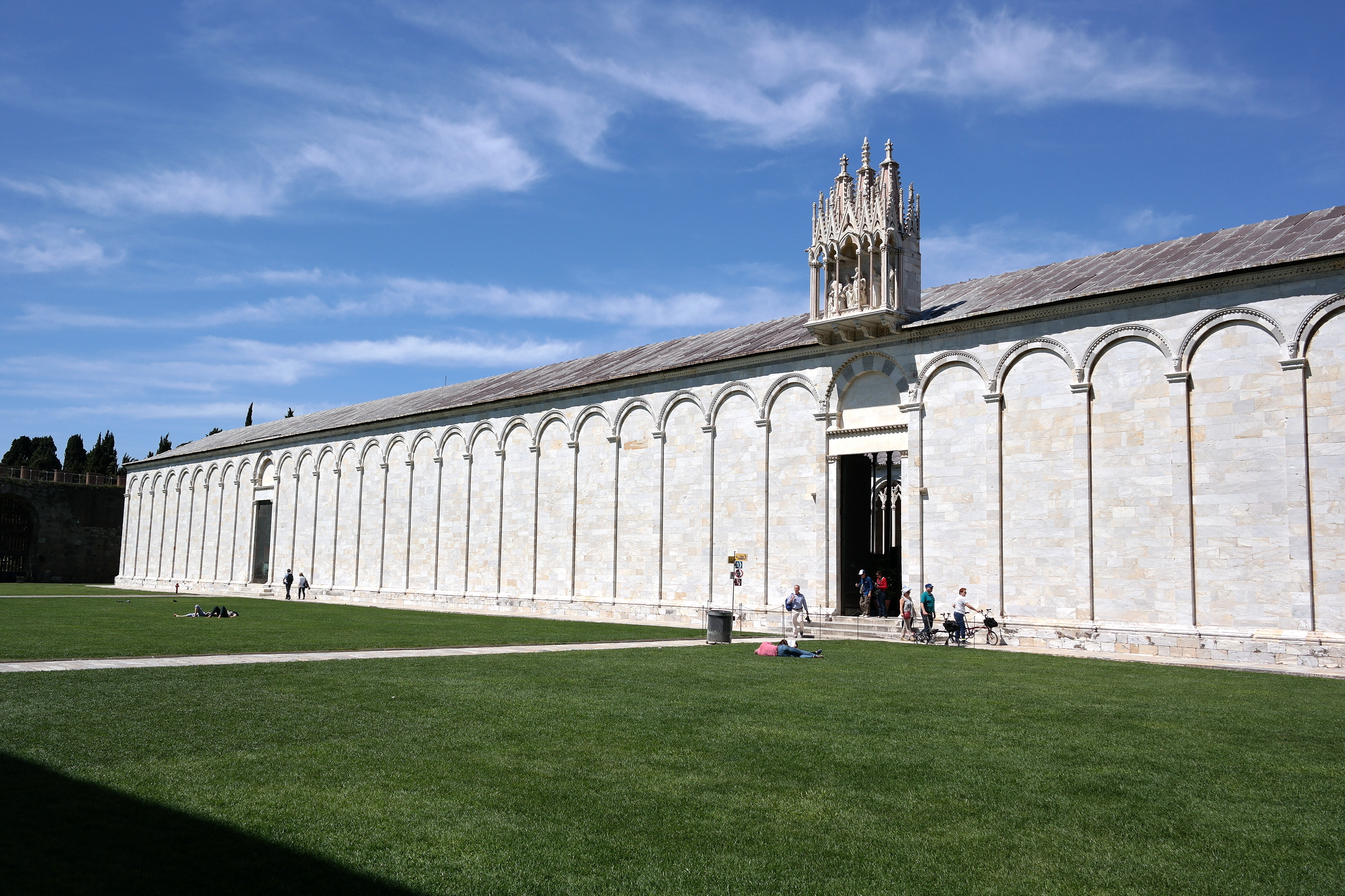 Esterno del Camposanto monumentale a Pisa